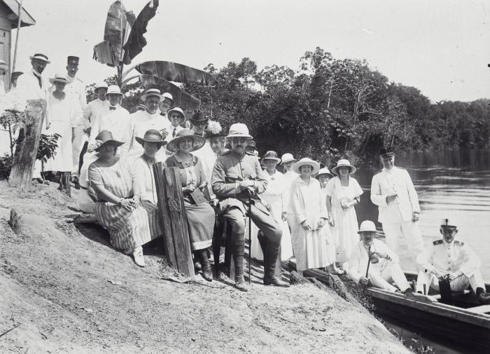 Foto. Een gezelschap met gouverneur Van Heemstra op de oever van de rivier Saramacca tijdens een tocht naar Kwakoegron en Maäbo